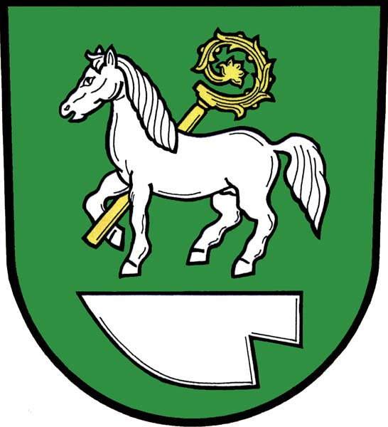 Znak obce Vysoká (okres Bruntál)